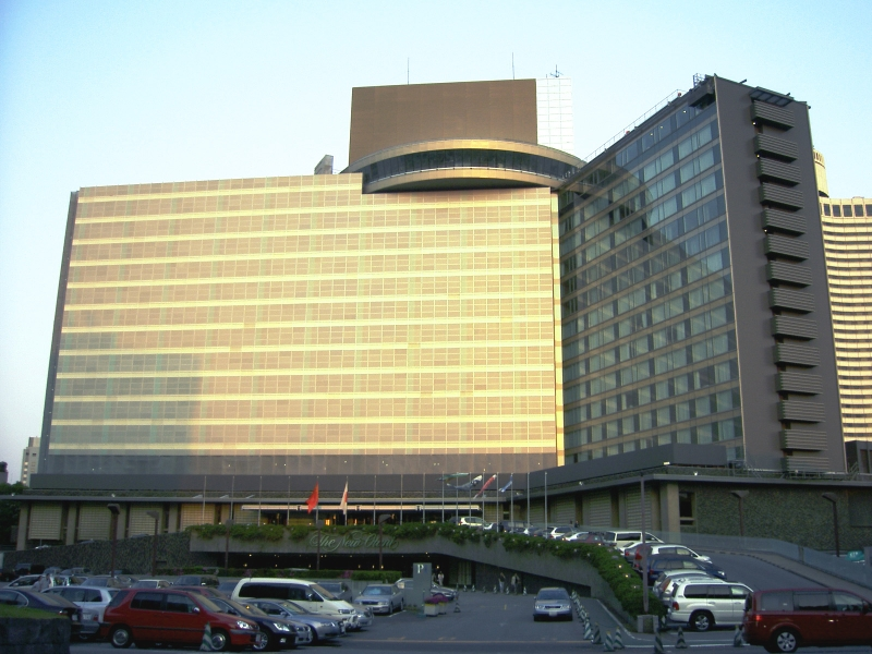 東京都千代田区紀尾井町4番1号 ホテルニューオータニ ザ・メイン（本館）の外観全景。 撮影者: DS80s(投稿者本人) 撮影年月: 2007年5月